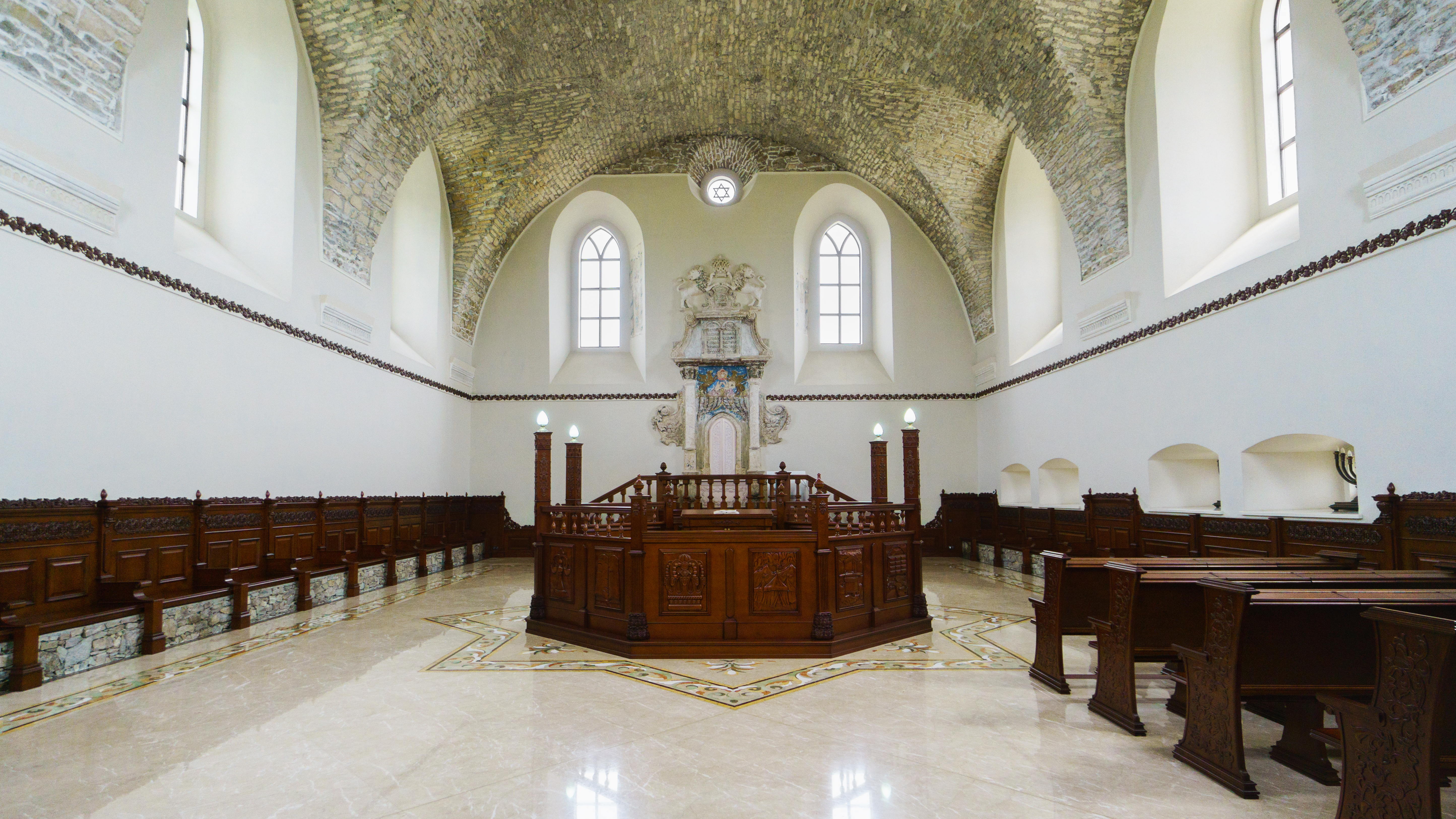 Синагога у смт Сатанів, Хмельницька обл.